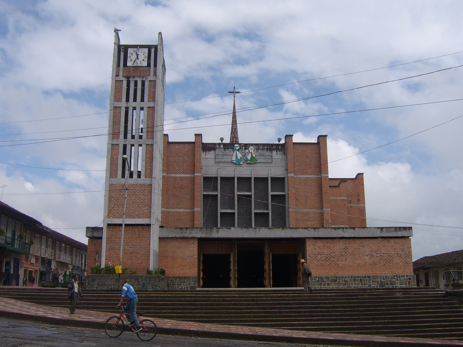 Vista de la fachada principal de la Catedral de Sonsón, Antioquia.